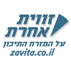 New logo of Zavita